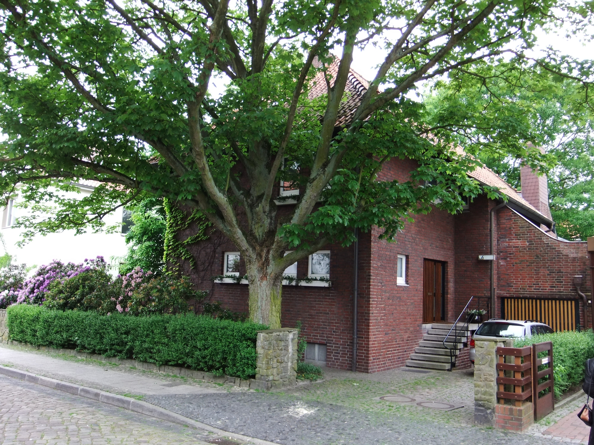 Haus Hoffmeyer in Bremerhaven, Friesenstraße 6. Das abgebildete Objekt ist ein geschütztes Kulturdenkmal in der Freien Hansestadt Bremen, mit der Nr. 1536 beim Landesamt für Denkmalpflege registriert.